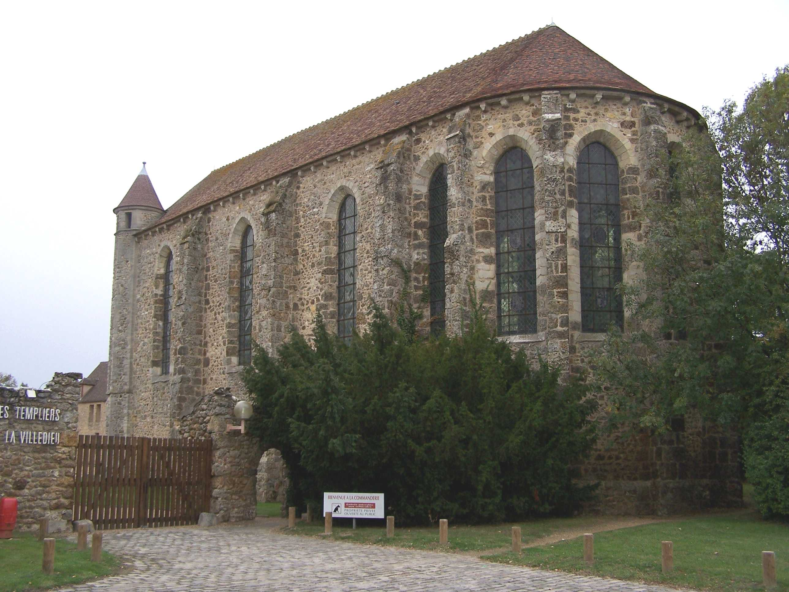 Entrée et chapelle de la Commanderie des Templiers à Élancourt (Yvelines, (France)